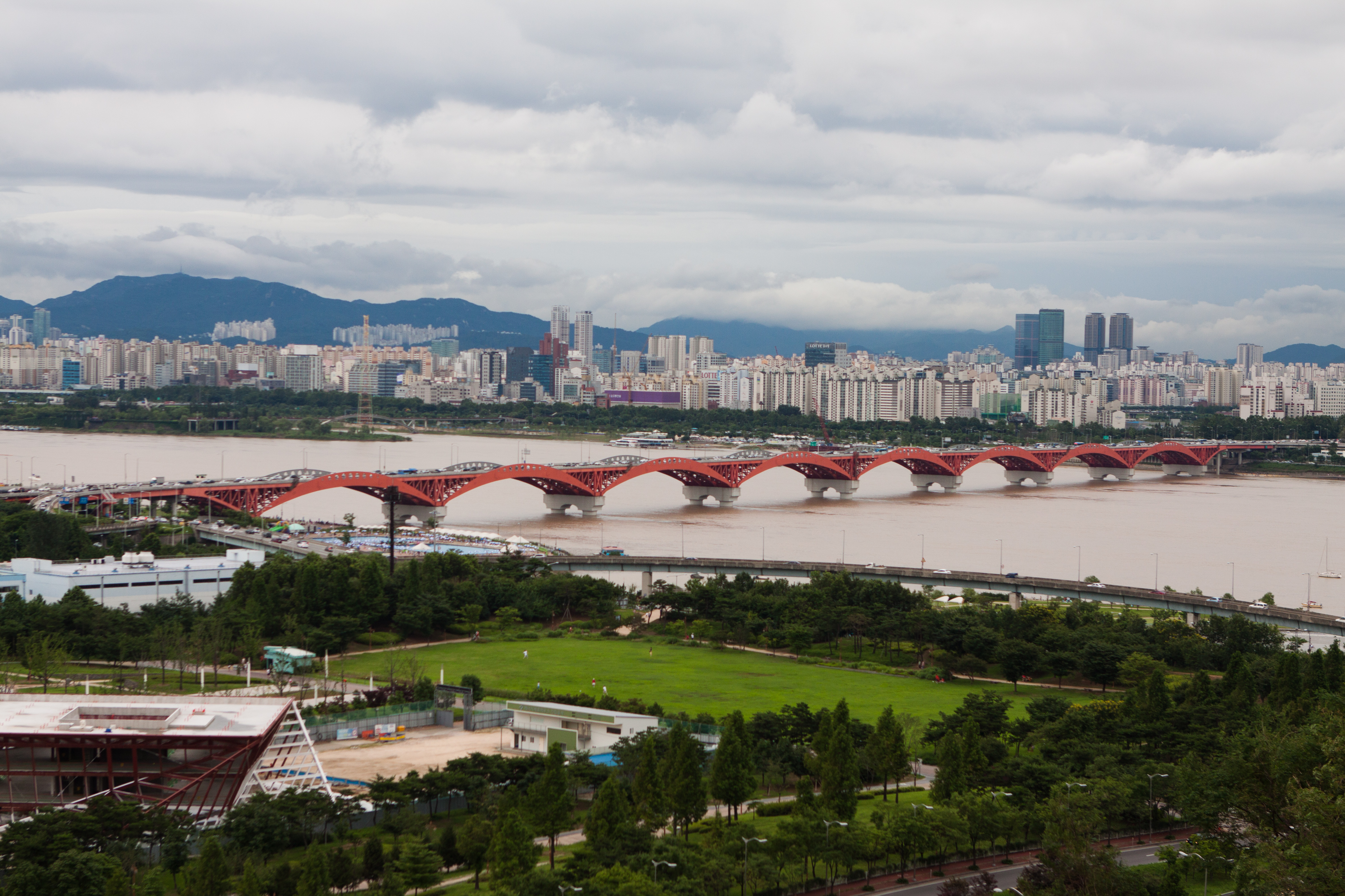 Seongsan Bridge